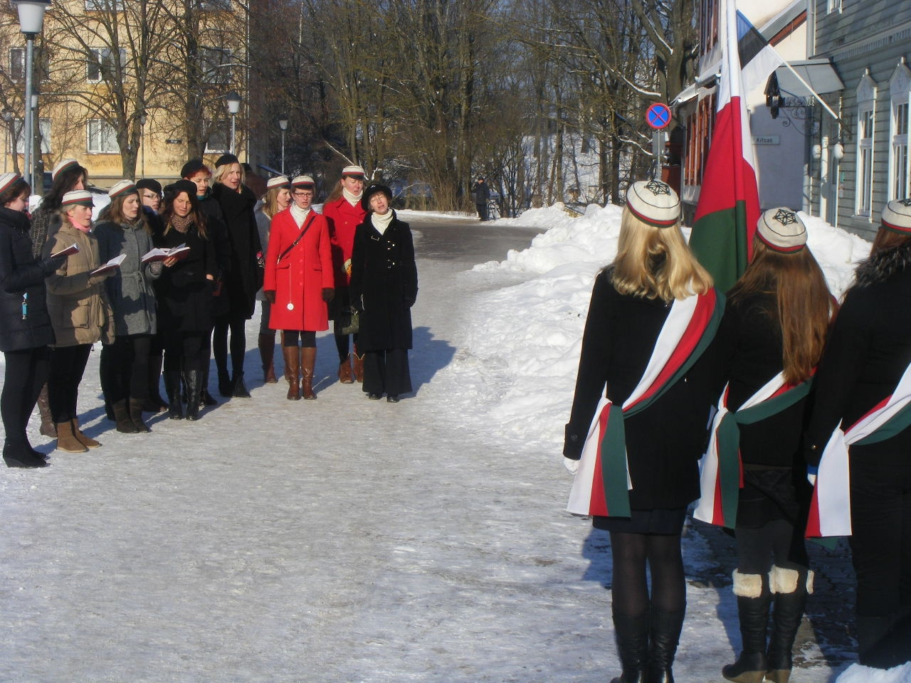 Korp! Filiae Patriae on äsja saabunud Tartu Tähetorni juurest liputseremoonialt.